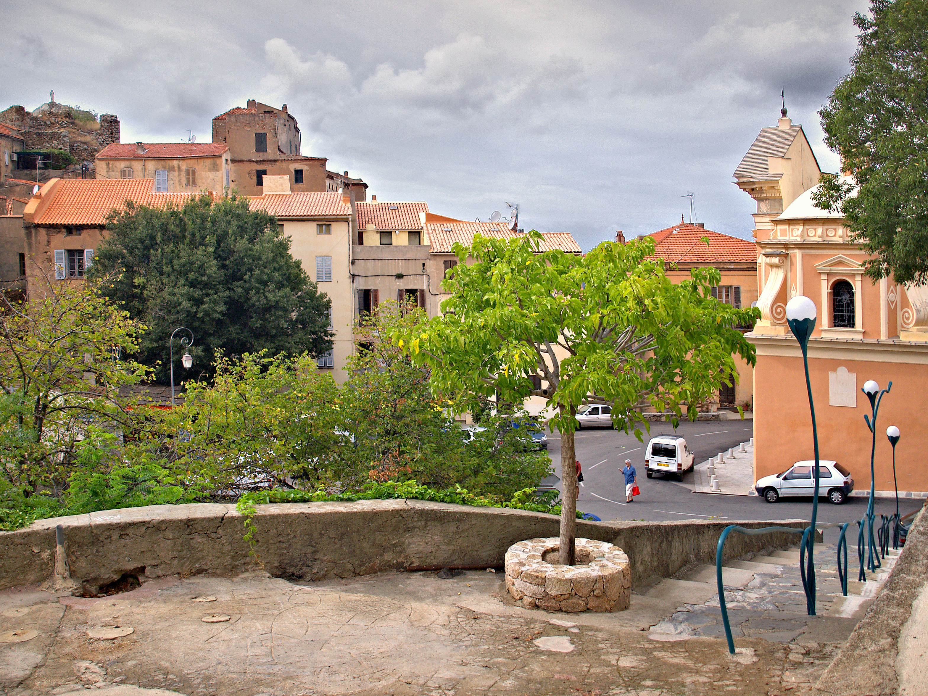 Belgodère - La place du village